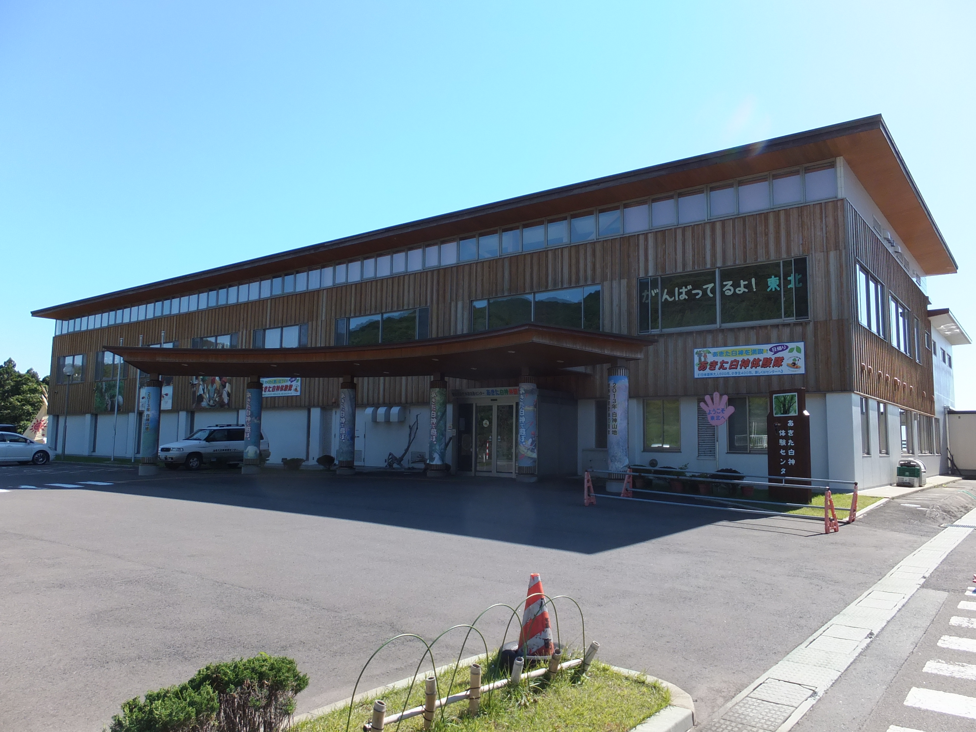 あきた白神体験センター（秋田県八峰町）、八森いさり火温泉ハタハタ館に隣接する宿泊研修施設である。